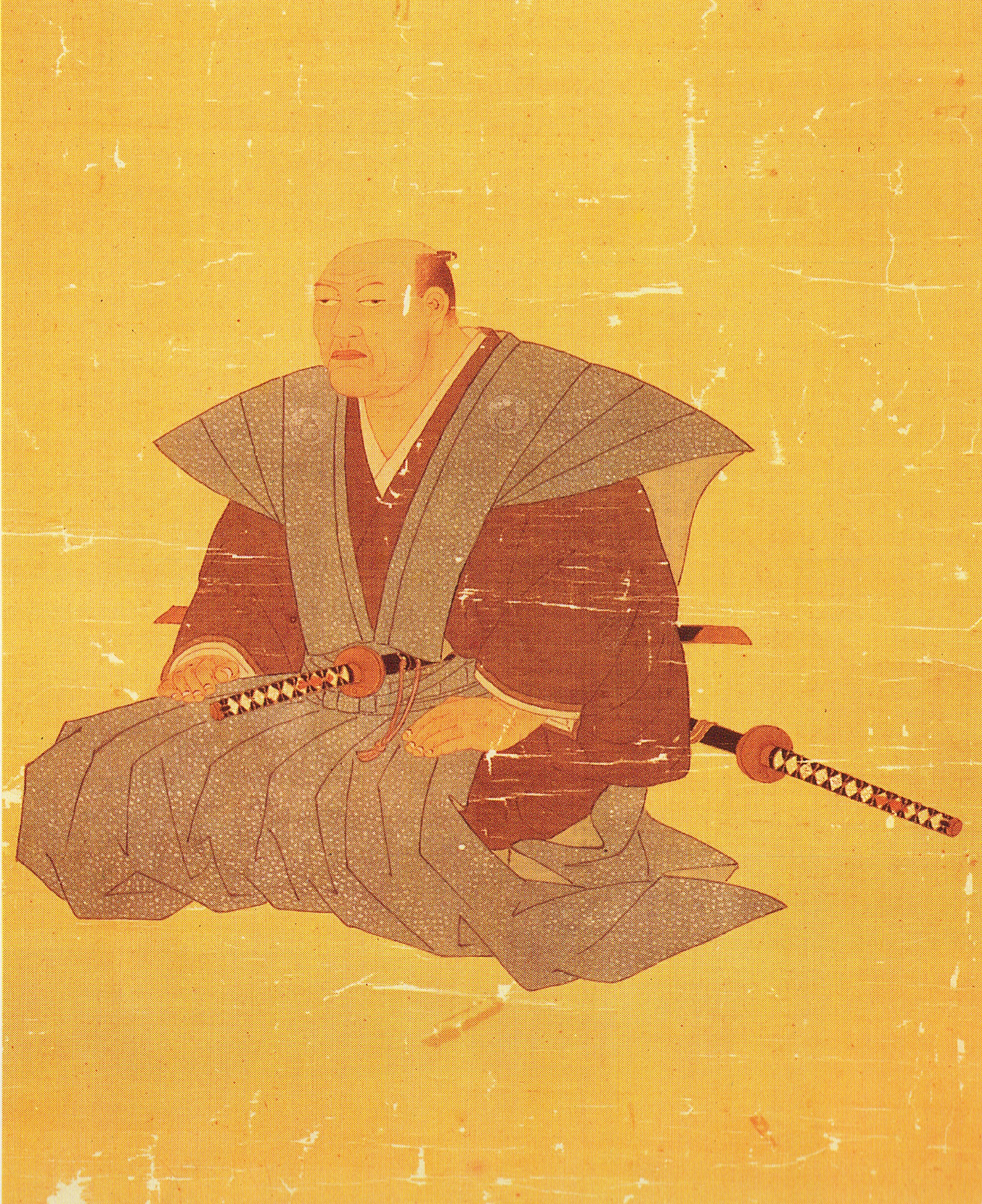 戸賀崎熊太郎暉芳の肖像。